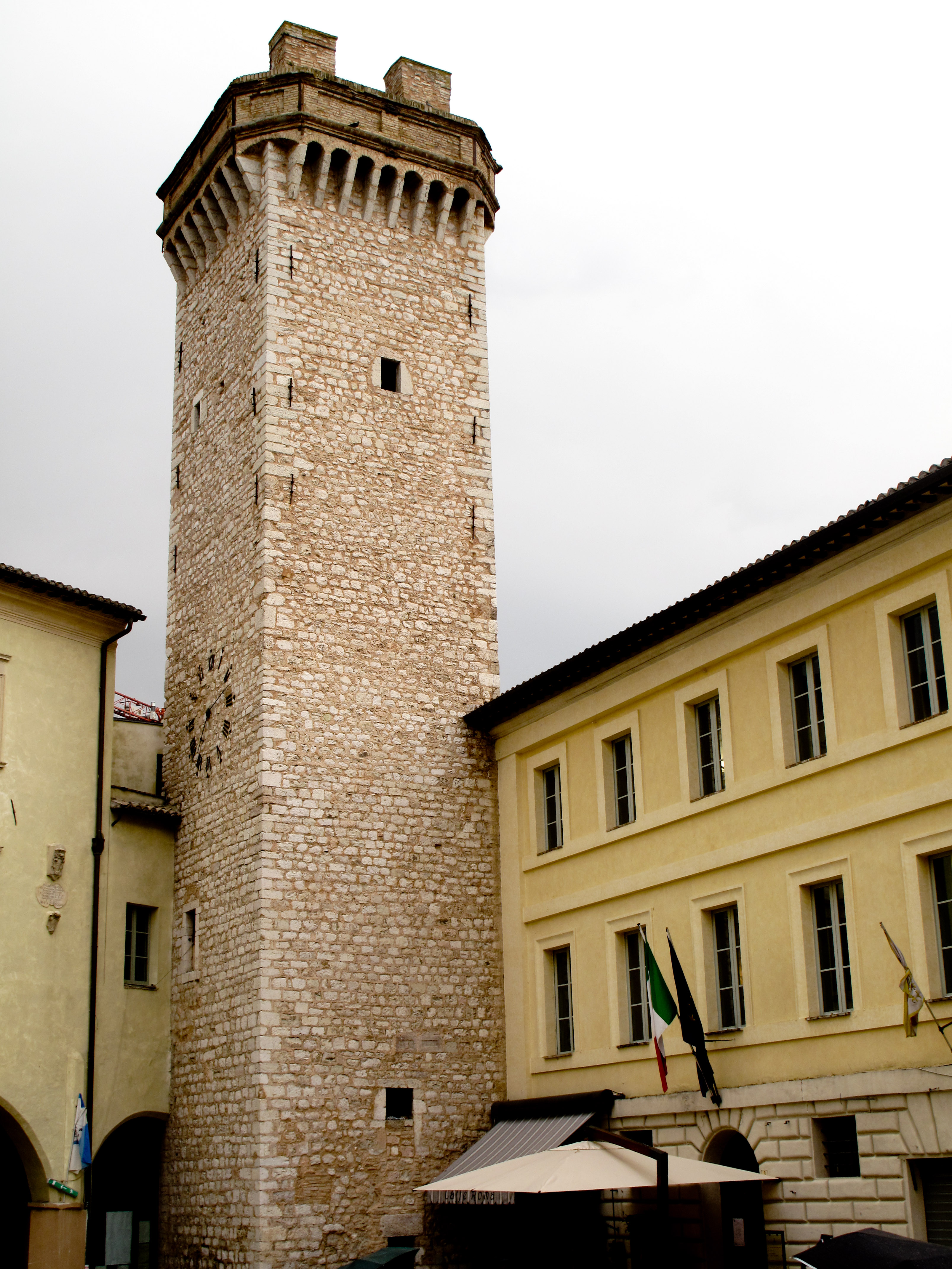 Torre comunale in Piazza del Comune